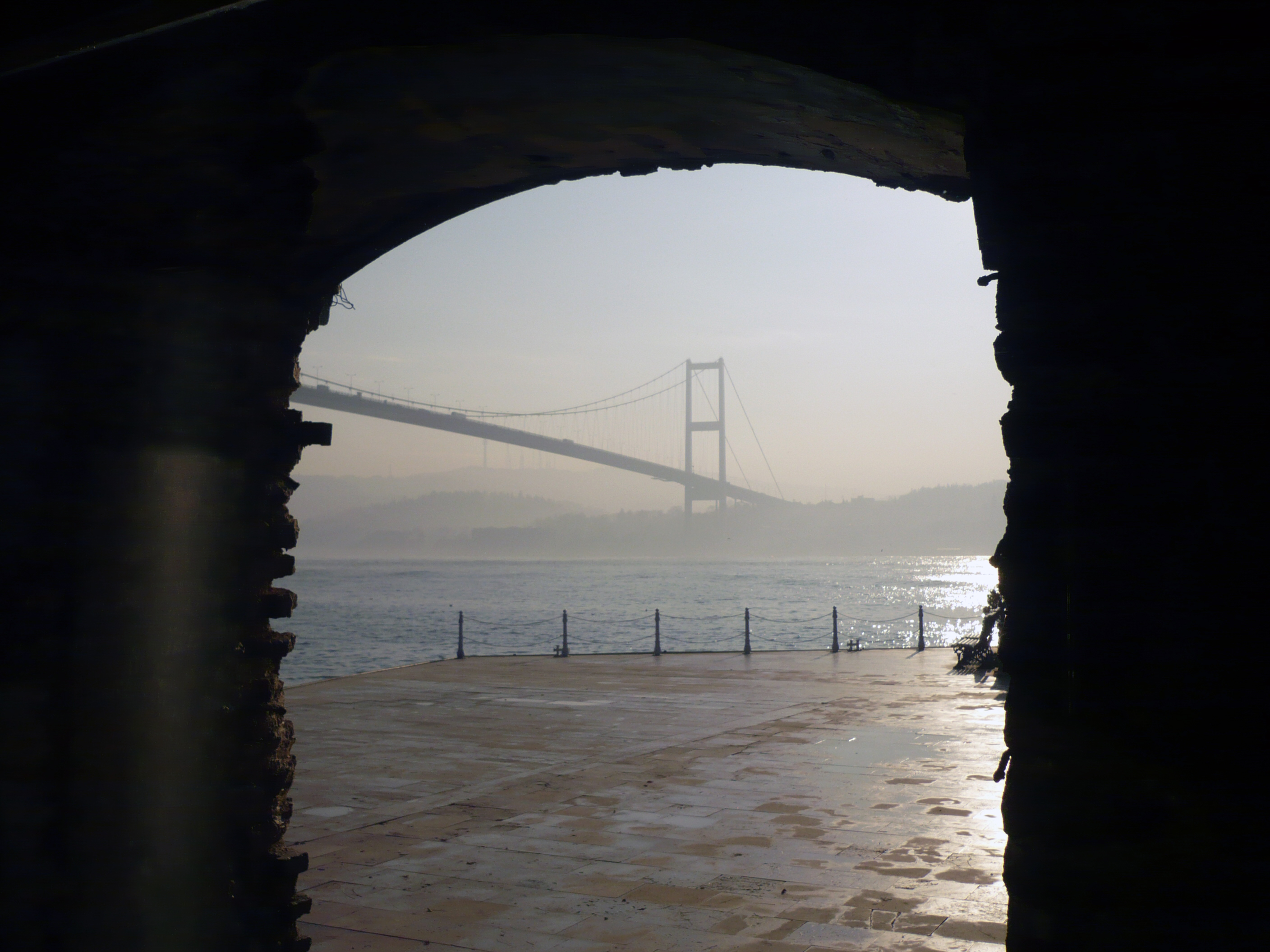 Esma Sultan Yalısı içinden Boğaz Köprüsü